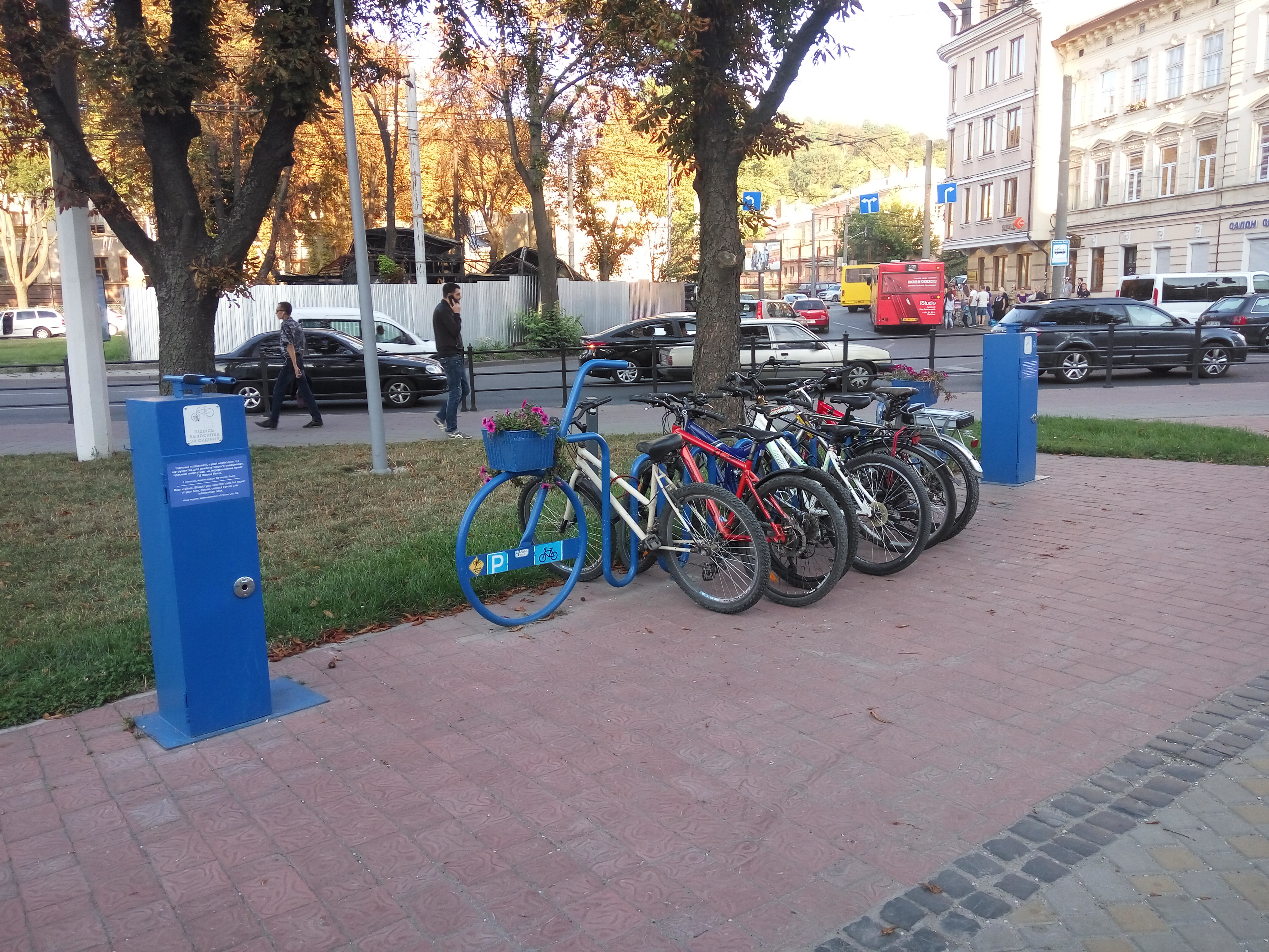 Велопарковка на пл. 700-річчя Львова біля ТРЦ "Форум Львів"